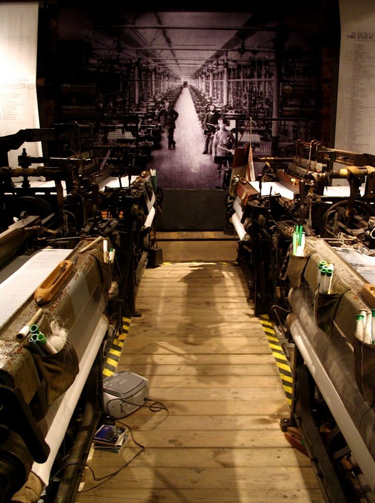 Muzeum Fabryki w Centrum Manufaktura w Łodzi